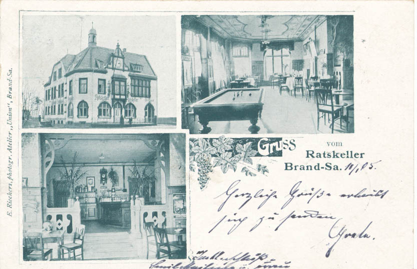 Ratskeller Brand